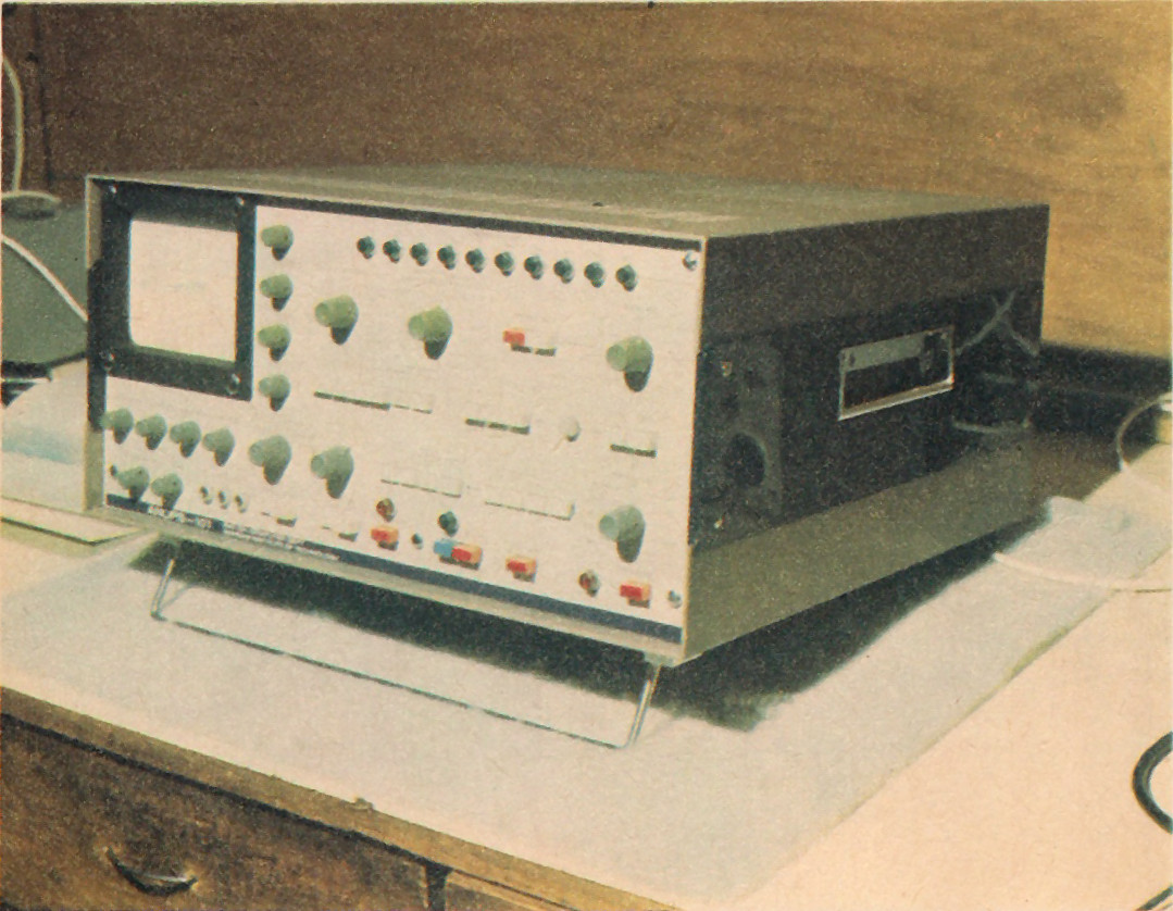 Komputer ANOPS 101